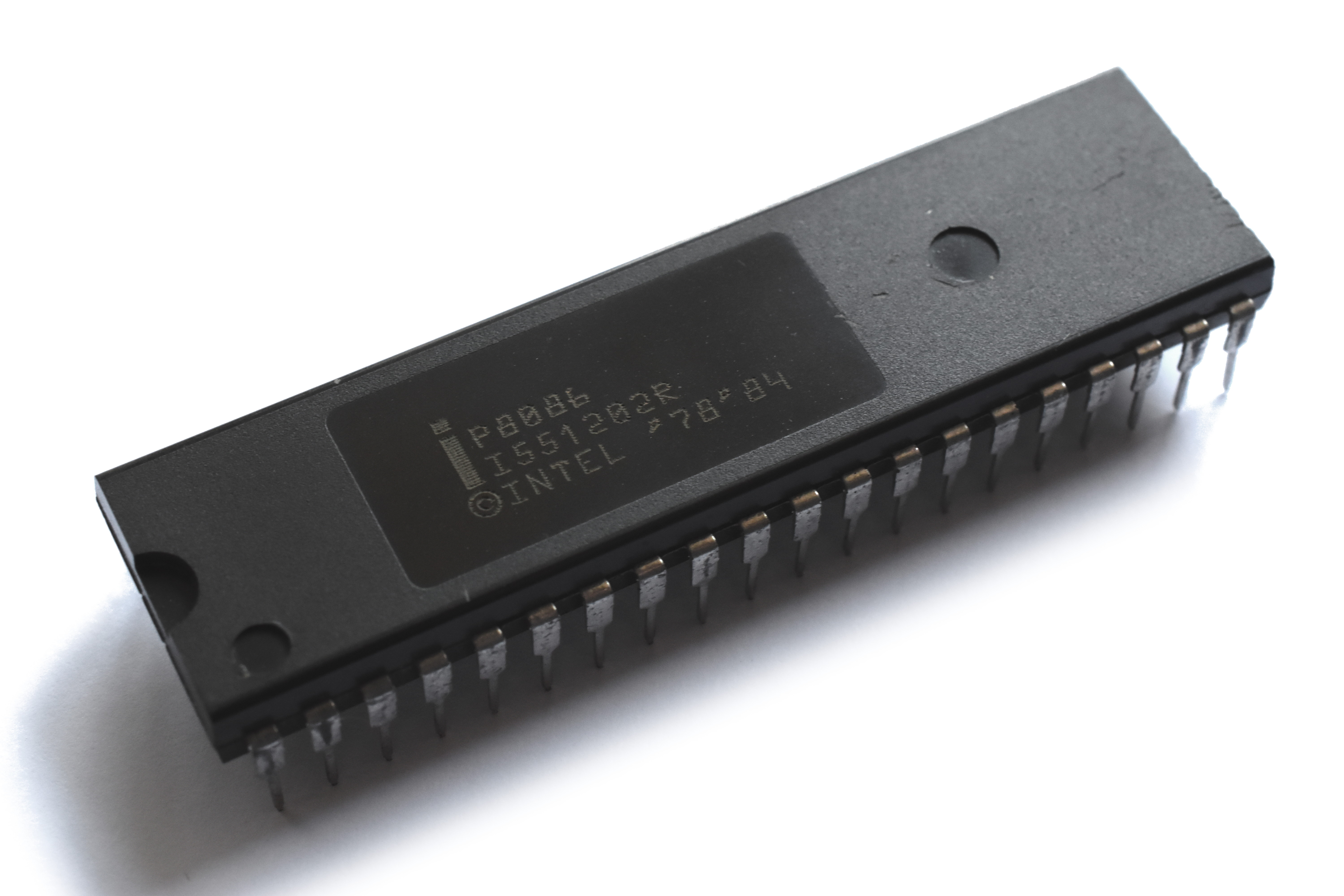 Procesoro Intel P8086.